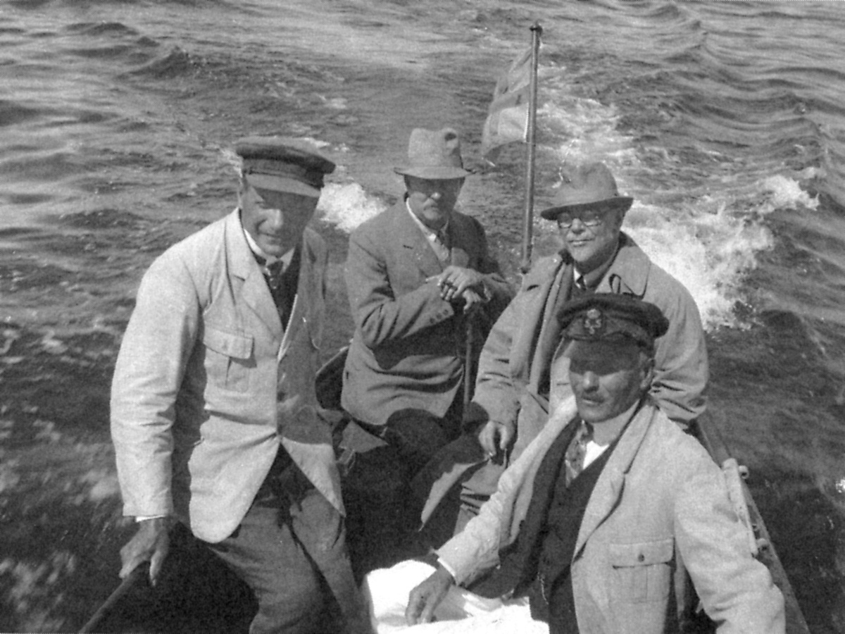 Från vänster: Bernhard von Schewen, Albert Eriksson, Albert Engström och Carl von Schewen.